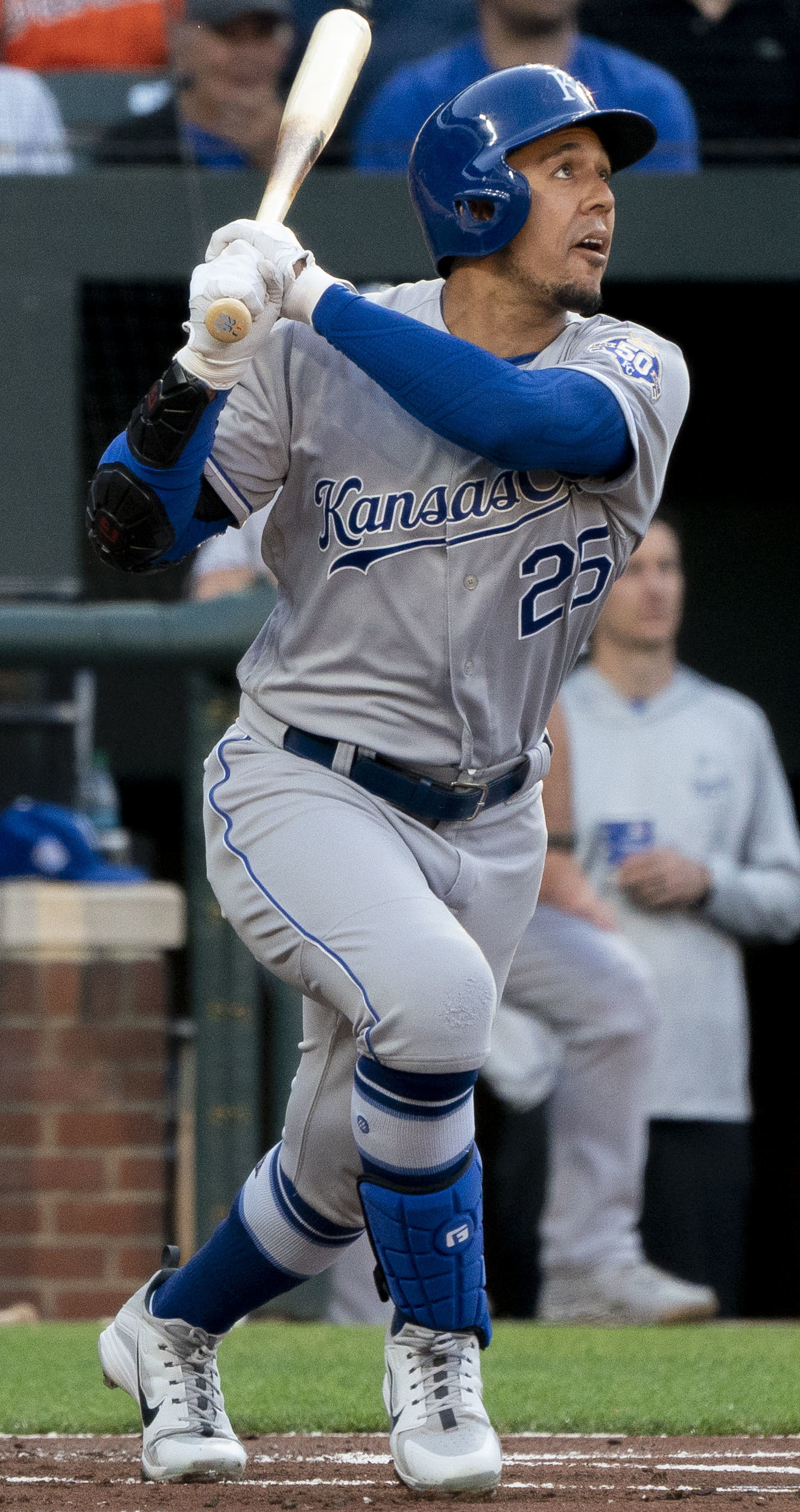 Royals at Orioles 5/9/18